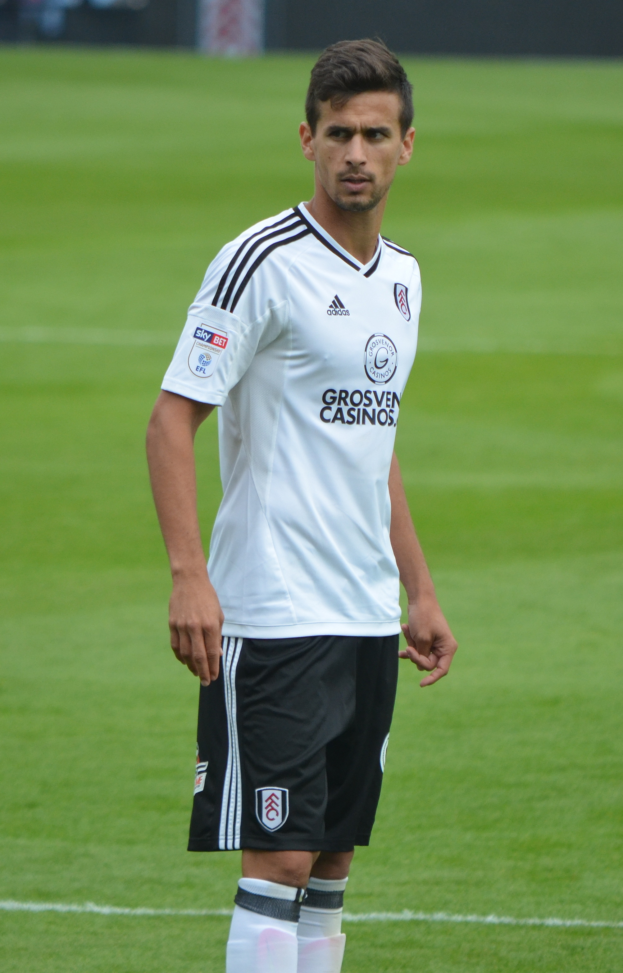 Rui Fonte, Fulham FC